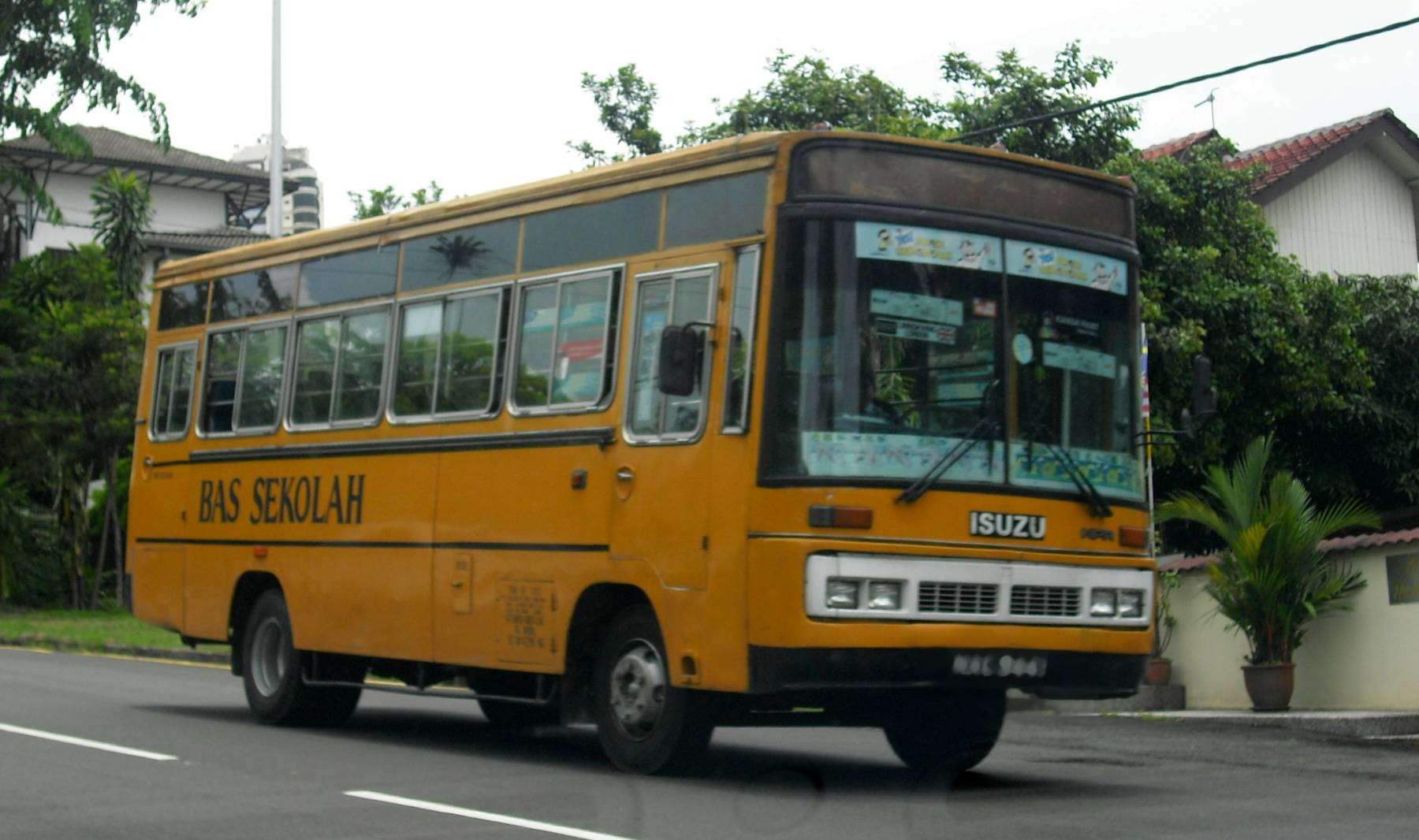 Schoolbus in Bangsar, Kuala Lumpur, Malaysia.